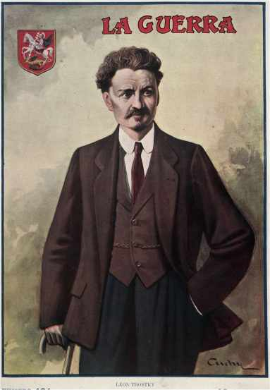 Ritratto di Leon Trotsky pubblicato in copertina dal periodico spagnolo La Guerra Ilustrada